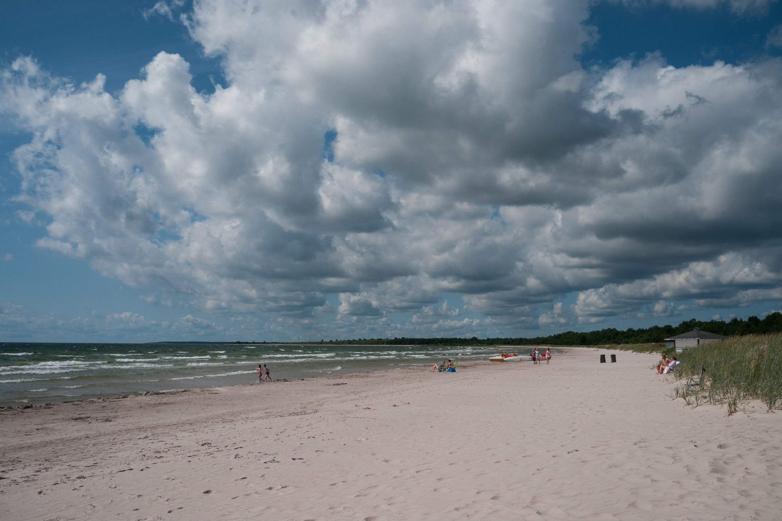 Sudersand